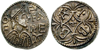 Pêni com busto diademado de Ofa